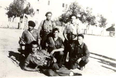 Antonio Téllez Solá (allongé devant), né le 18 janvier 1921 à Tarragone (Catalogne, Espagne) et mort le 26 mars 2005 à Perpignan, est militant anarchiste espagnol et combattant antifranquiste. Résistant maquisard en Aveyron, journaliste et historien de la résistance libertaire en Espagne.